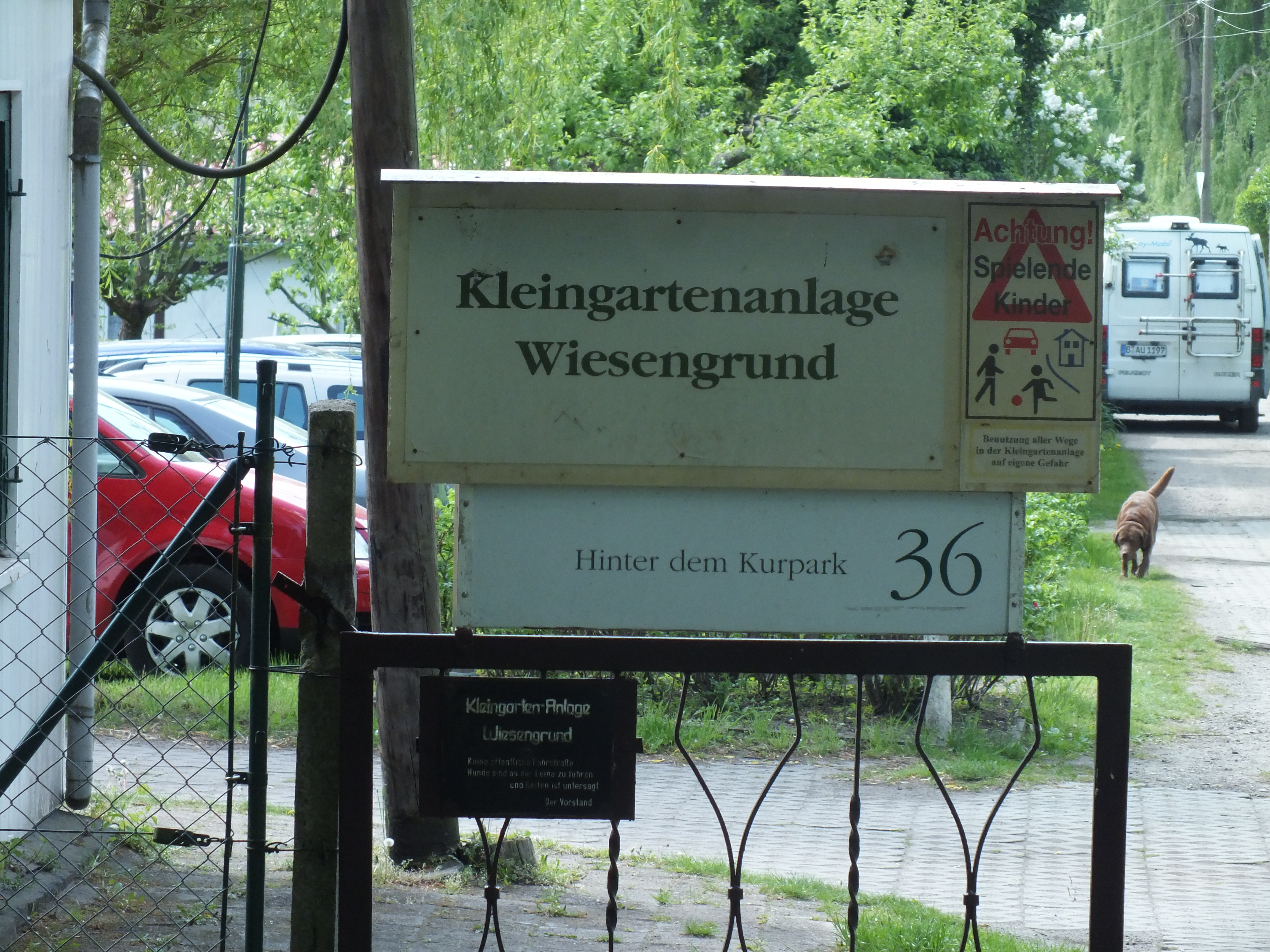 Berlin-Friedrichshagen: Kleingartenanlage Wiesengrund, Adresse Hinter dem Kurpark